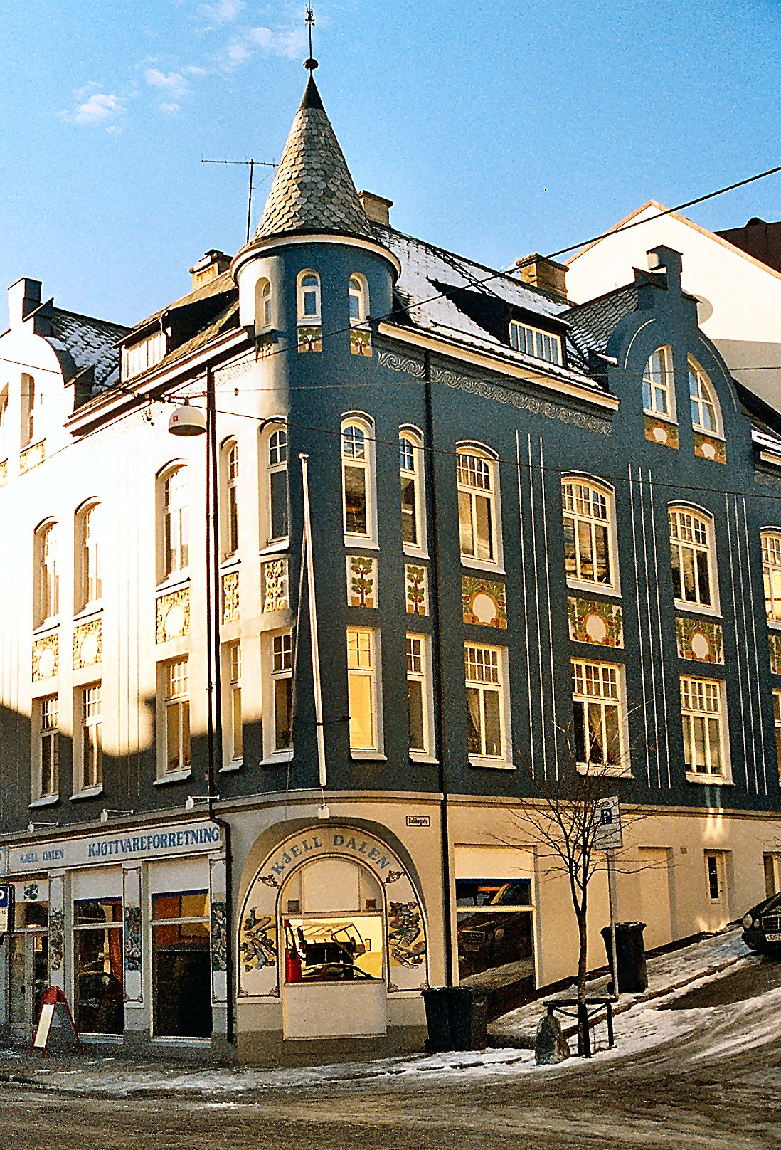 Jugendstil in Alesund